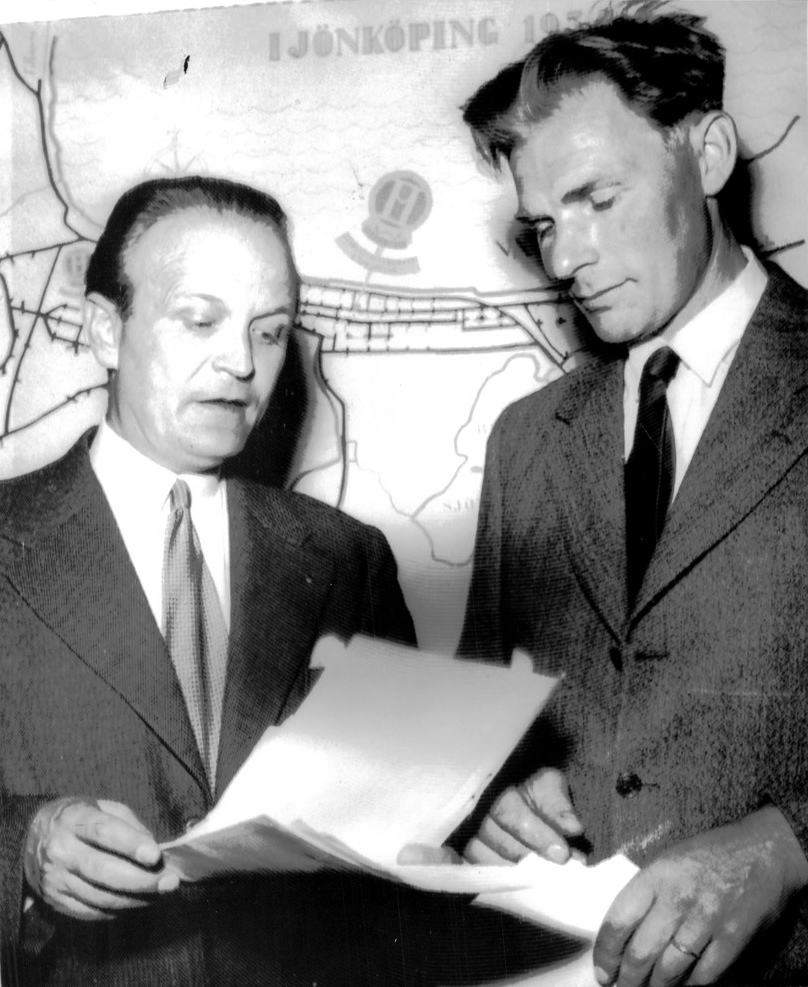 Ungdomsförbundets avgående ordförande, redaktör Bengt Lind, i samspråk med efterträdaren, lantmätare Birger Isacsson.